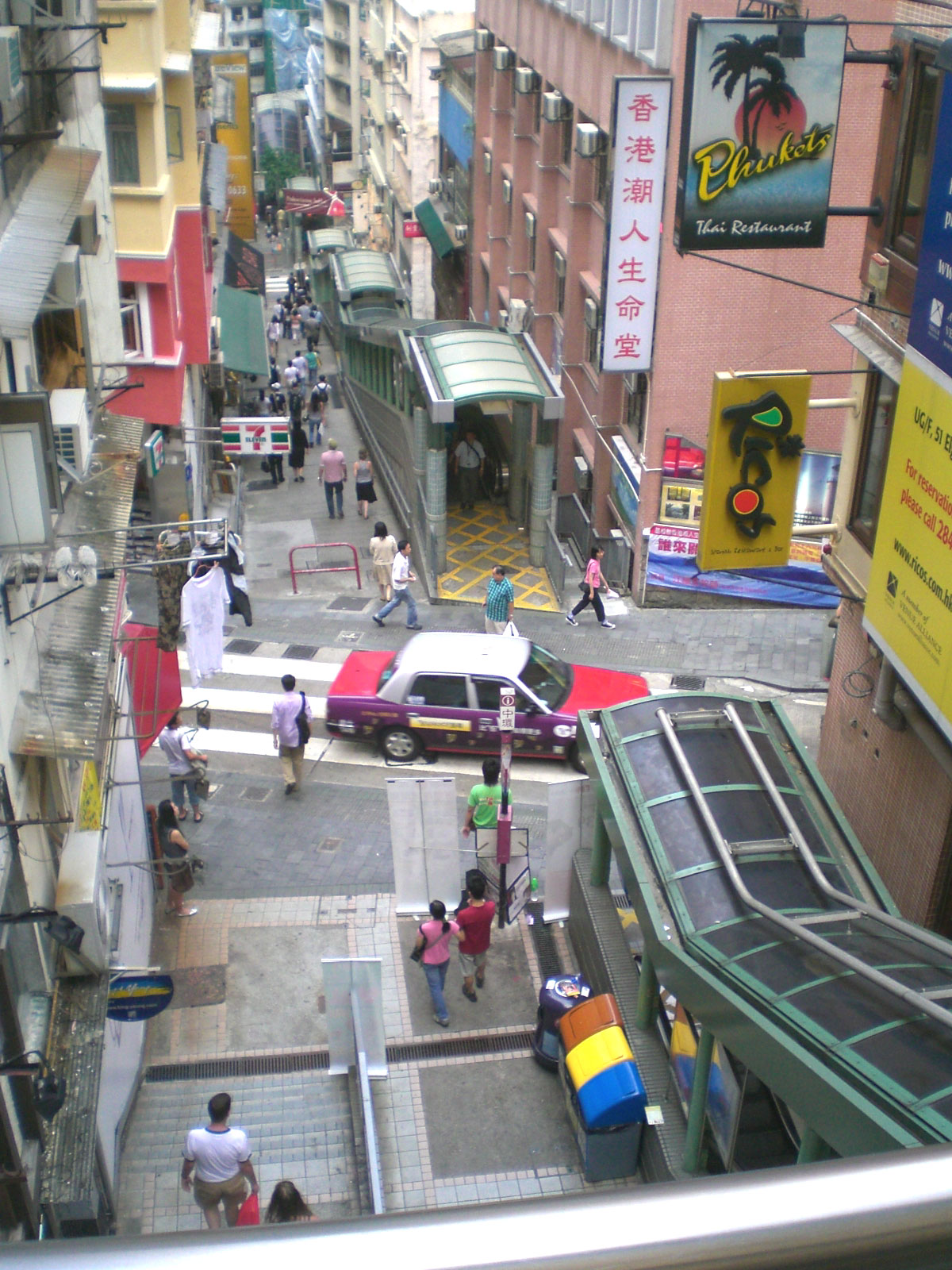 些利街中環至半山自動扶梯系統&基督教香港潮人生命堂 Hong Kong Swatone Christian Church